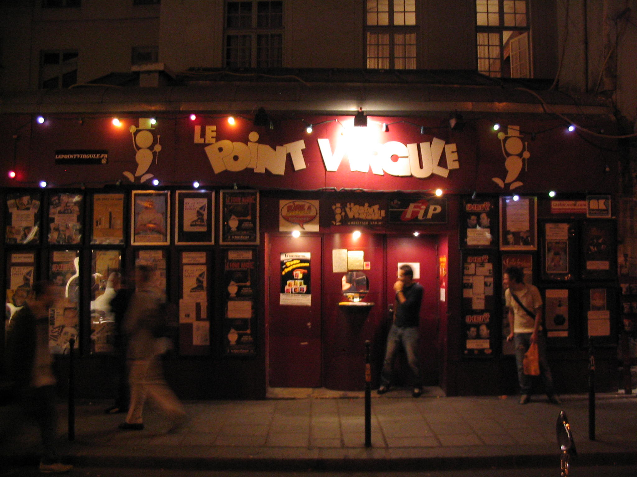 L'entrée du théâtre du Point Virgule de nuit.